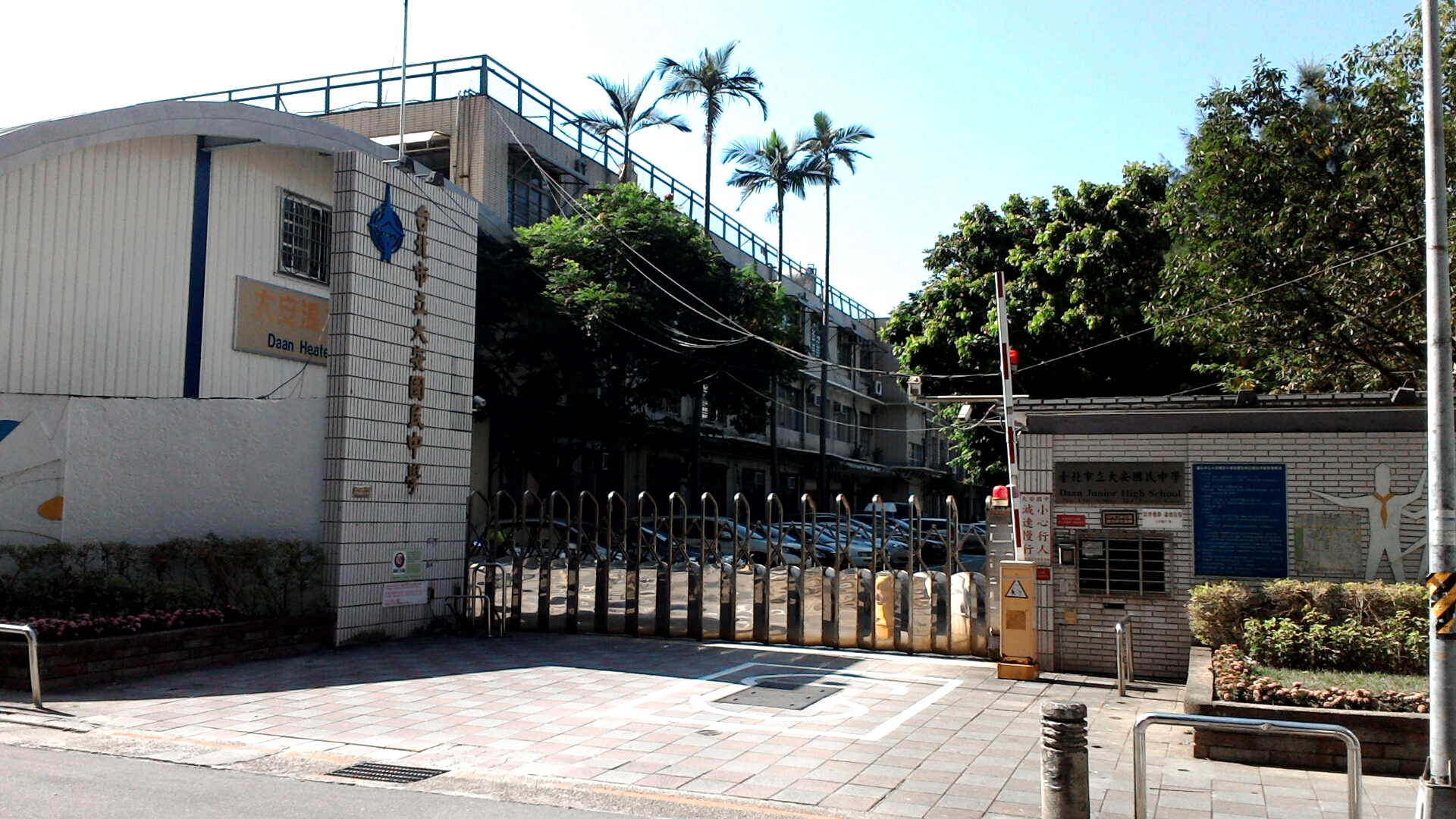 臺北市立大安國民中學後門